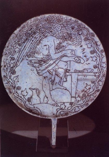 Miroir étrusque avec représentation de Calchas sous la forme d'un Haruspice. Vulci, Ve siècle av. JC. Musée du Vatican Couleurs inversées